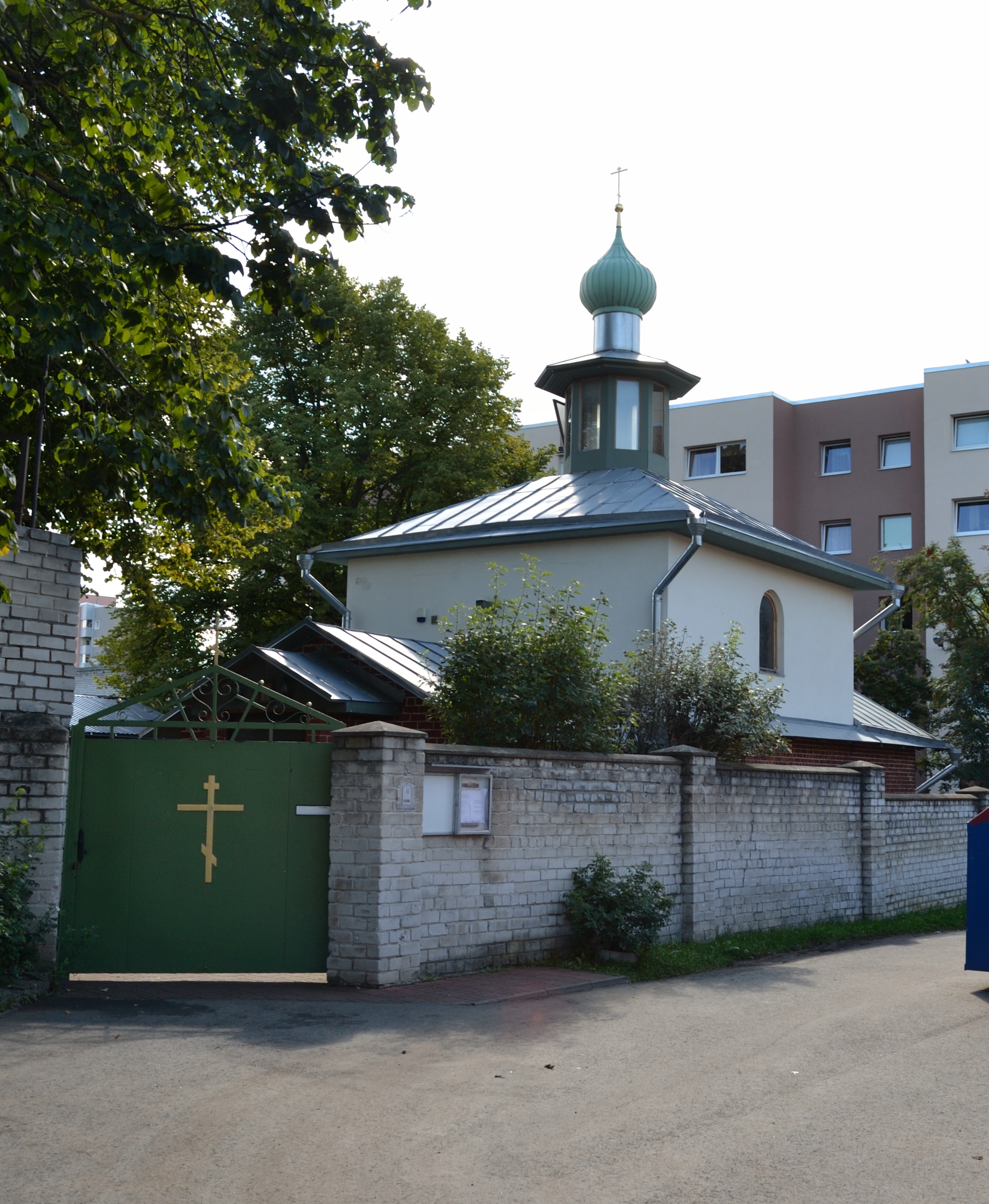 Tallinn, Balti Puuvillavabriku asula kirik, 1913